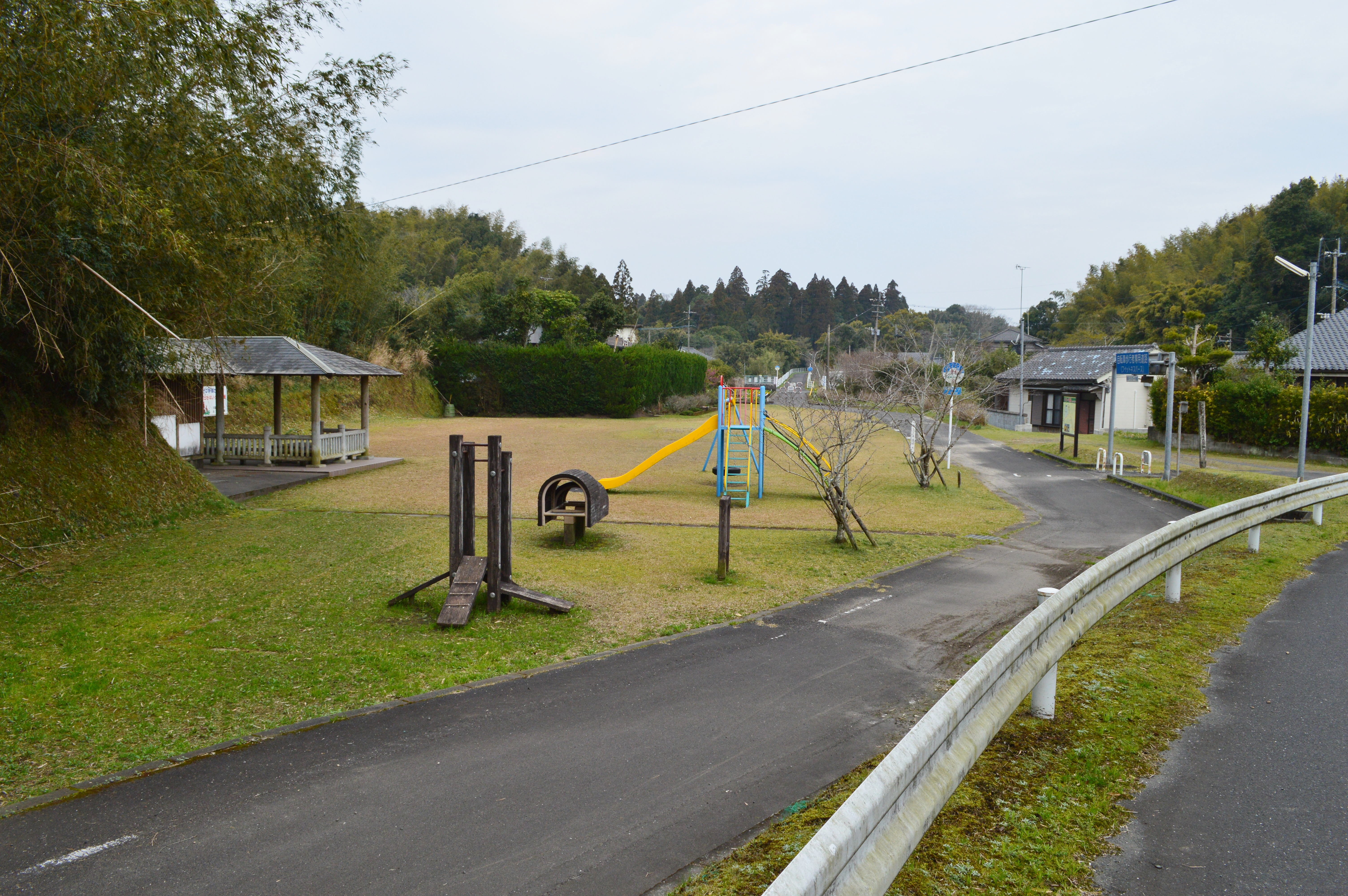 永野田駅跡